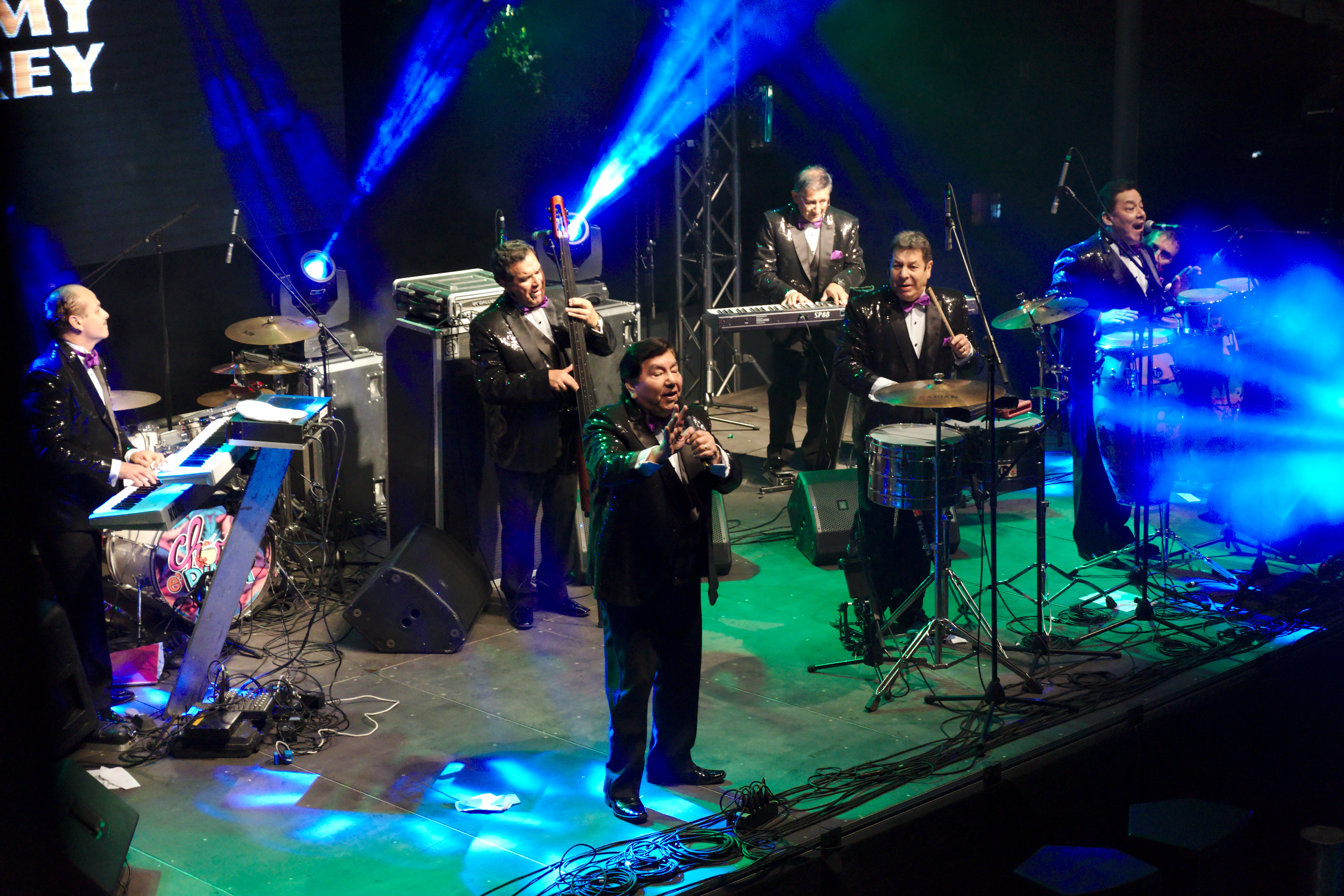 La Sonora de Tommy Rey. CCSA (07/04/2018)